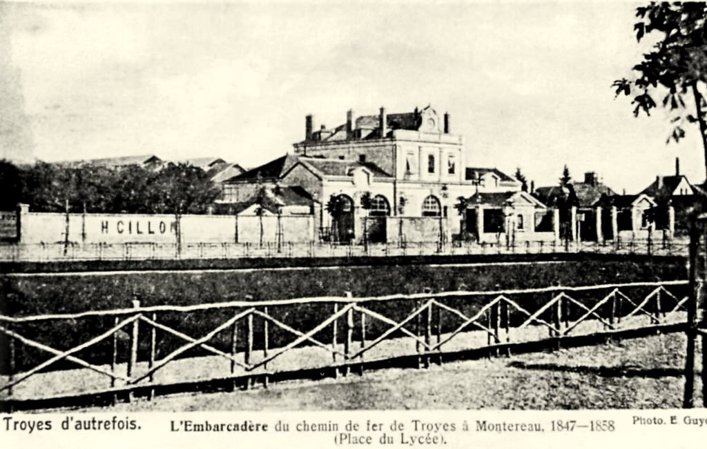 Carte postale de de l'embarcadère de Troyes, département de l'Aube, France, Guyot (E.), impr.-édit., région de la Ferté-sous-Jouarre (Seine-et-Marne)